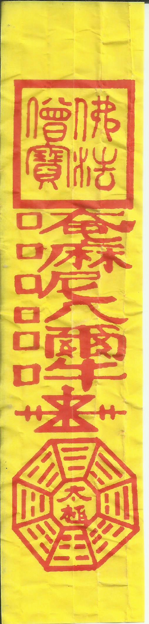 中文（台灣）: 澎湖觀音亭平安符，印六字真言，有淨符功能。